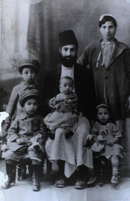 משפחת יוסף בבגדאד שבעירק